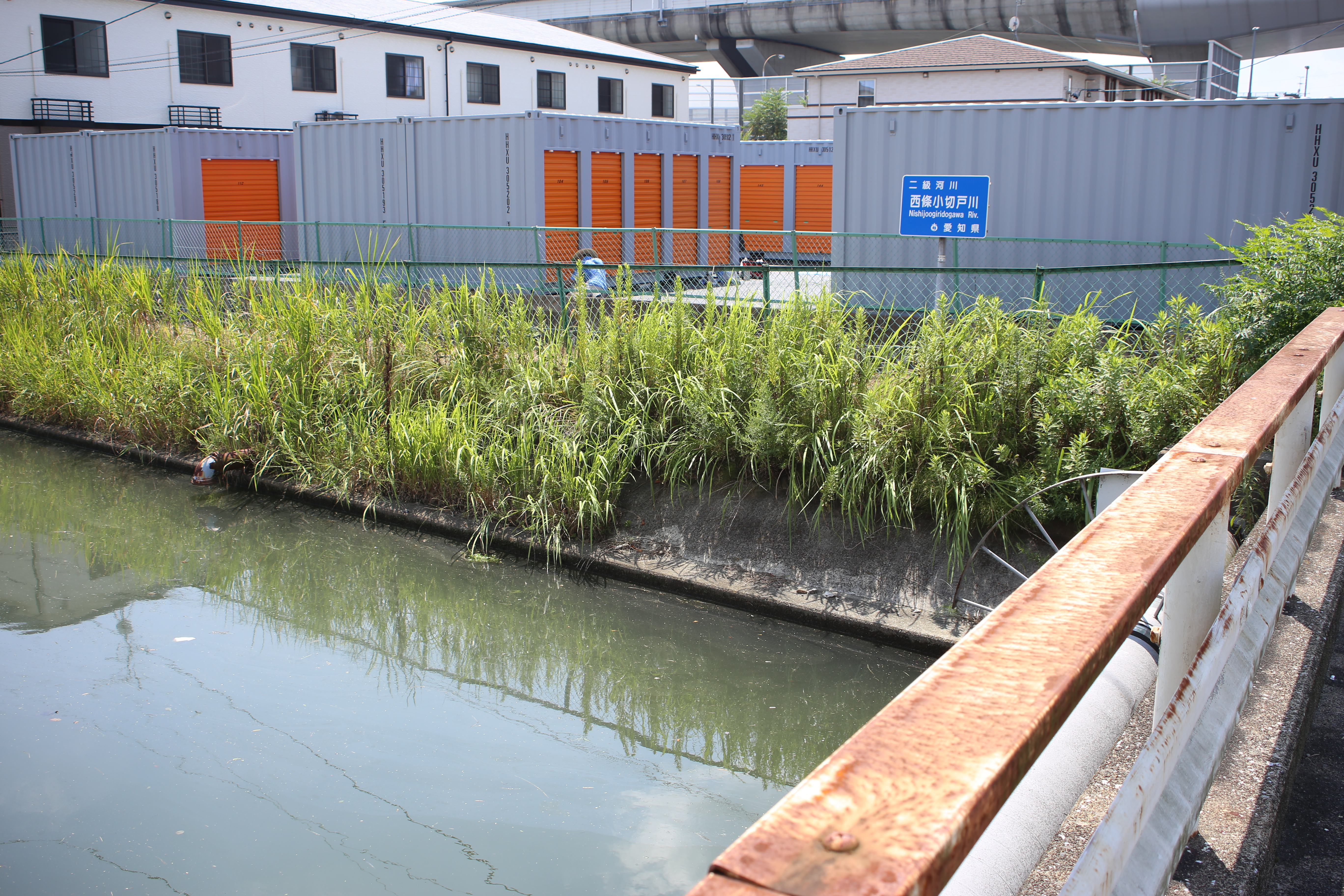 愛知県海部郡大治町西條地内の西條小切戸川